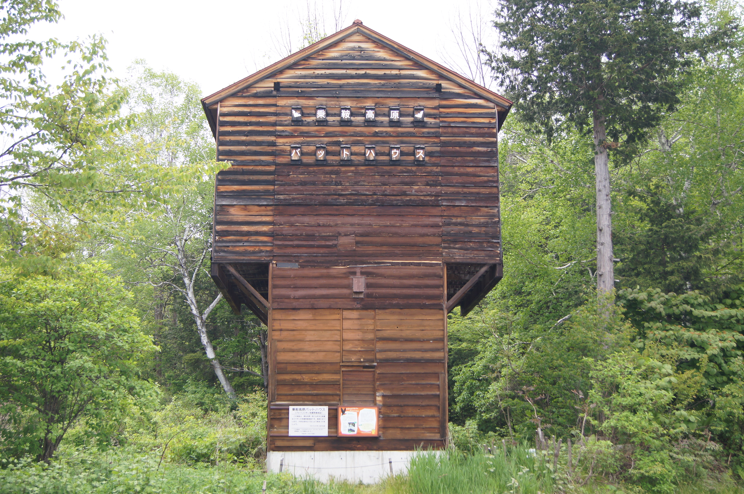 長野県松本市安曇の乗鞍高原にある長野県乗鞍自然保護センターにあるバットハウス（蝙蝠の営巣用建物）